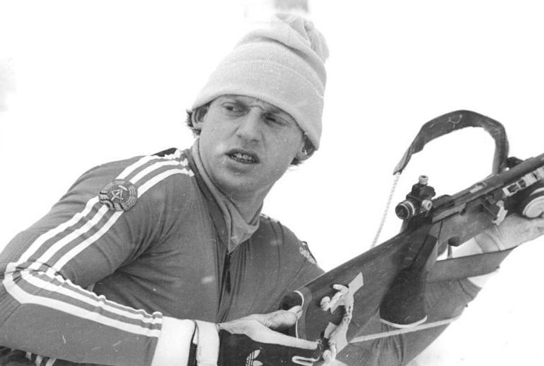 Holger Wick ADN-ZB Schaar 3.2.84 Bez. Suhl: 27. DDR-Meisterschaften im Biathlon in Oberhof- Der 21jährige Junioren-Weltmeister in der Staffel, Holger Wick (ASK Vorwärts Oberhof), gewann über 10 km in 32:12,9 min (1 Strafrunde). Nach dem gemeinsamen Sieg mit dem zeitgleichen Matthias Jacob im 20-km-Einzellauf am 31.1.84 holte er sich damit bereits den zweiten Titel.